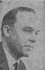 Arkitekten Nils G. Brink